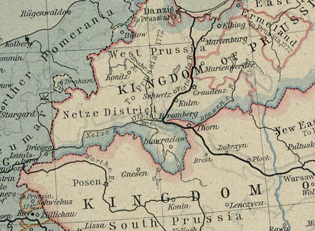 Netzedistrict 1786 - public domain van